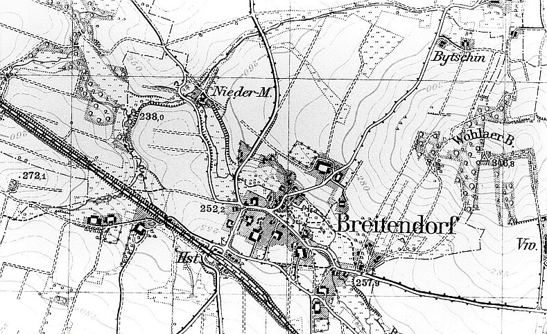 Original image description from the Deutsche Fotothek Hochkirch-Breitendorf. Meßtischblatt, Sekt. Hochkirch, Nr. 4853